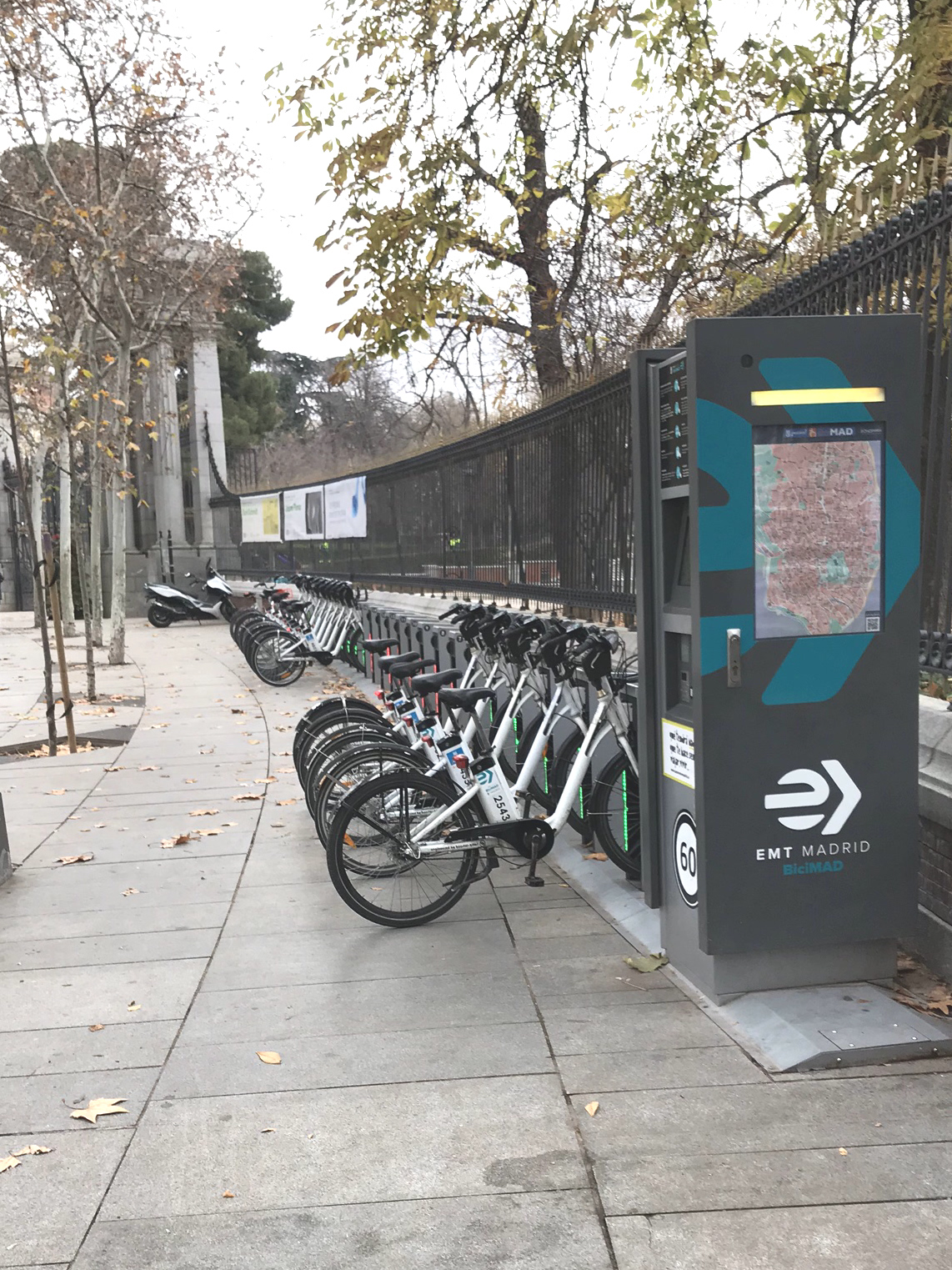 Eine öffentliche Ladestation für Elektrofahrräder vor dem Park Jardines del Buen Retiro (Parque del Buen Retiro am Places de Cibeles) im Zentrum von Madrid.